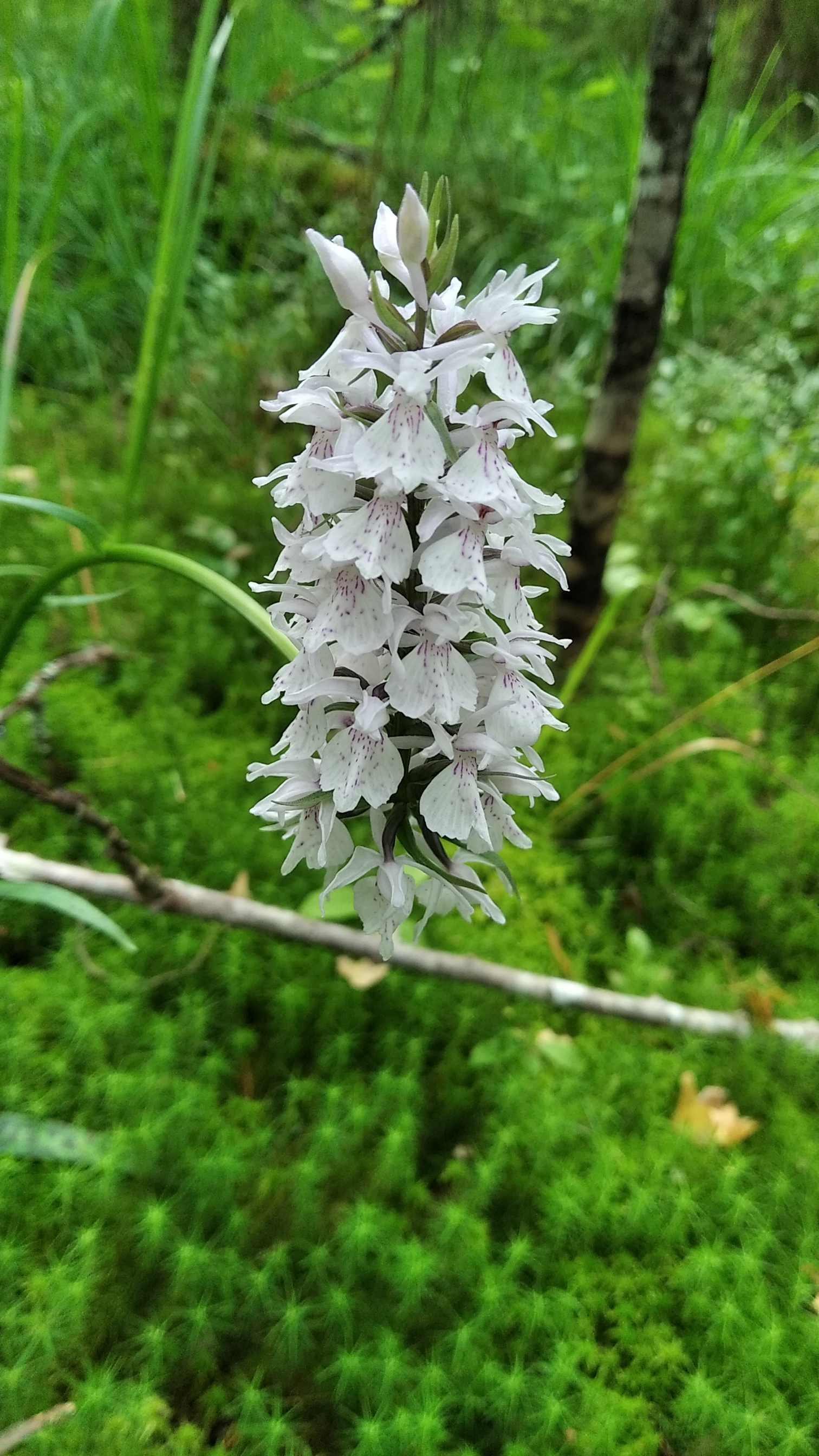 Пальчатокоре́нник балти́йский (Мшинское болото)